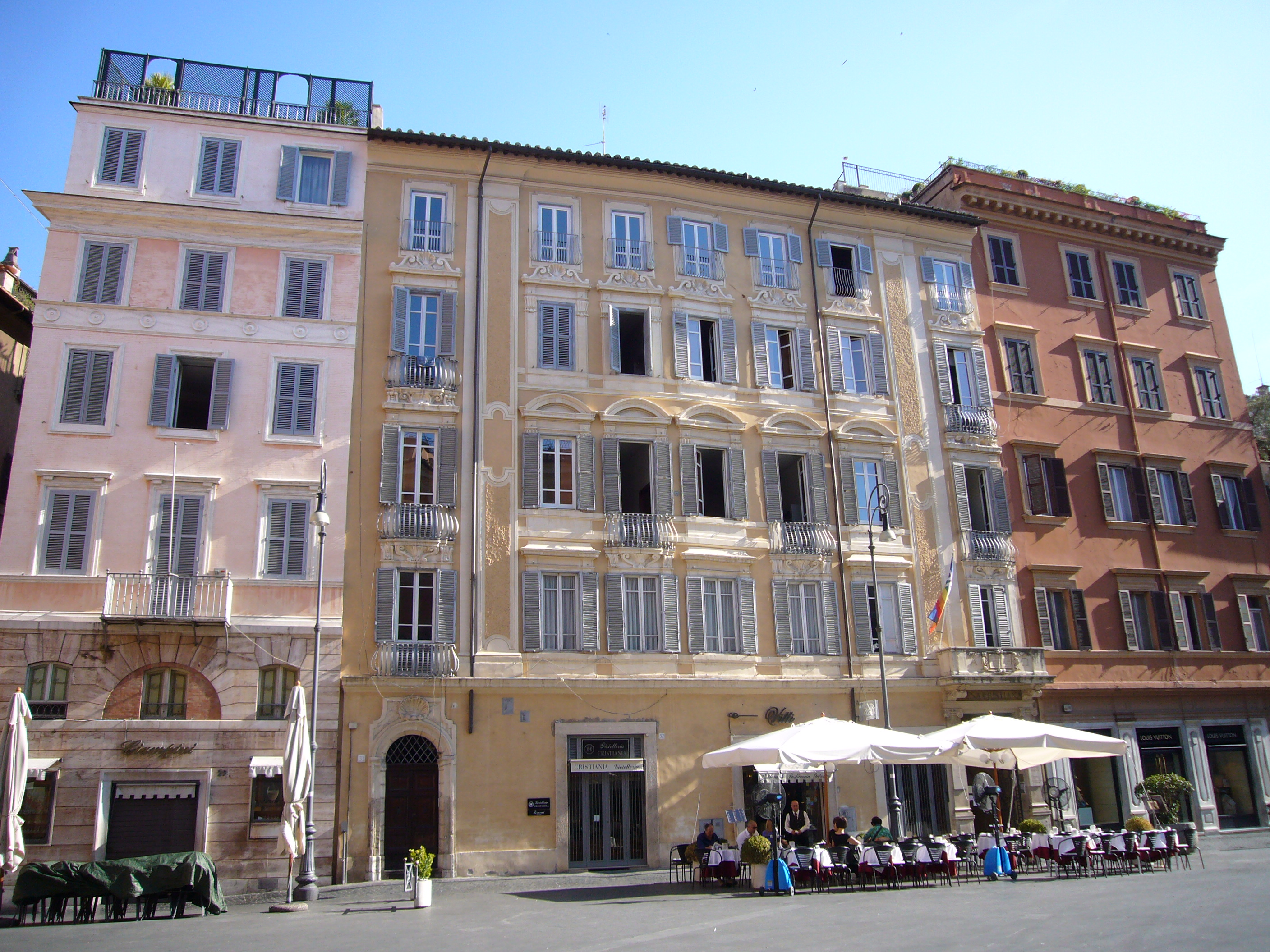 Roma, piazza S. Lorenzo in Lucina lato Campo Marzio.